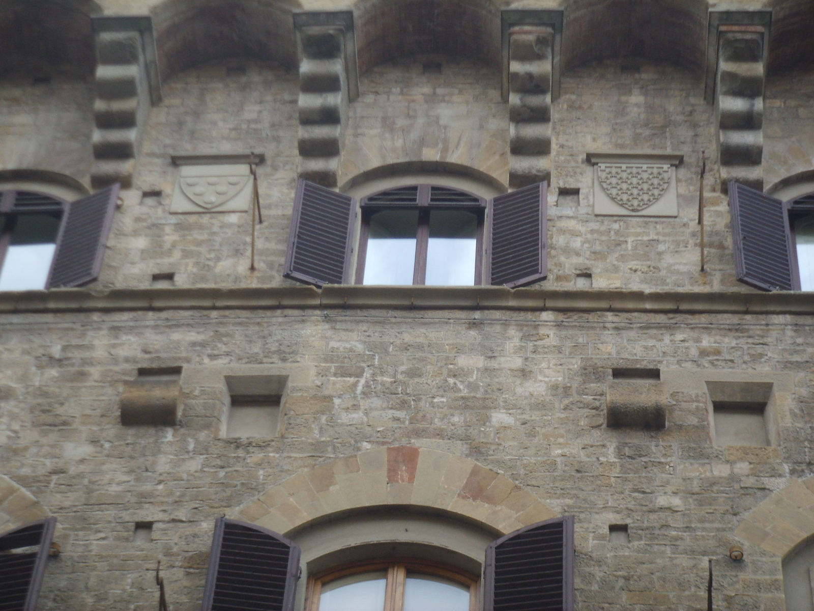 Torre dei gianfigliazzi, stemmi medici e altro